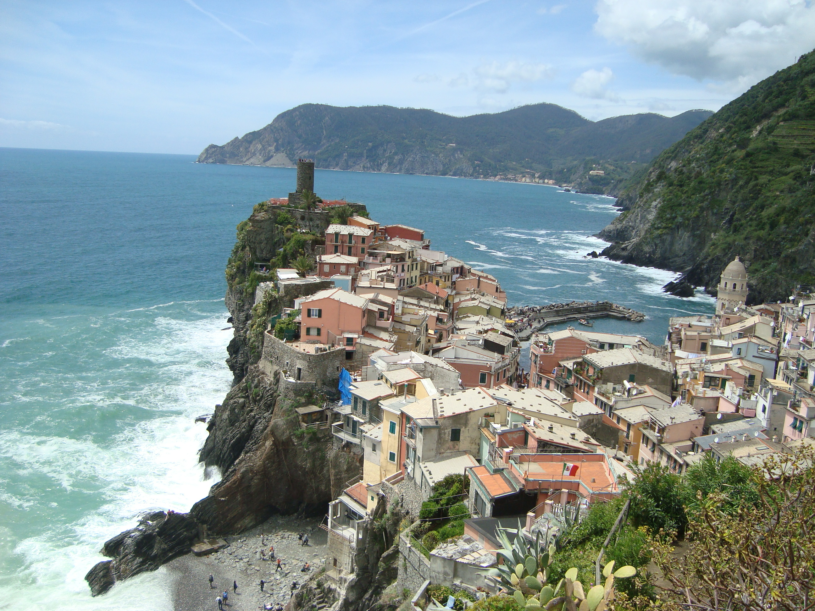 Vernazza